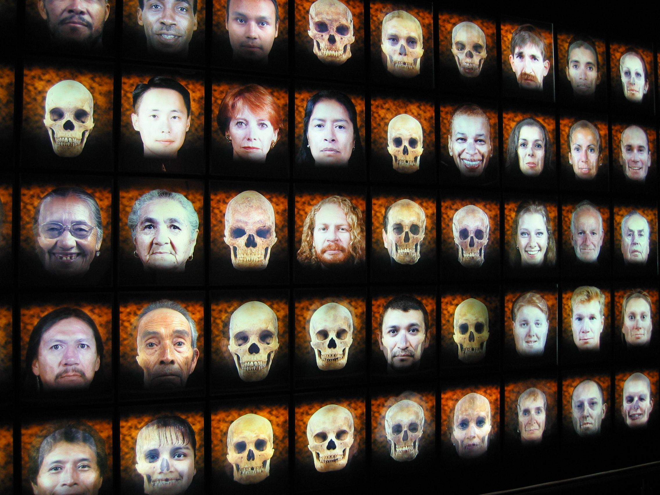 Mosaico de la diversidad humana. Sala de Introducción a la Antropología, Museo Nacional de Antropología de México